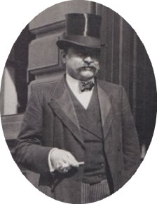 Vojtěch Václav Sternberg (1868 - 1930), Rakouský a český šlechtic a politik.